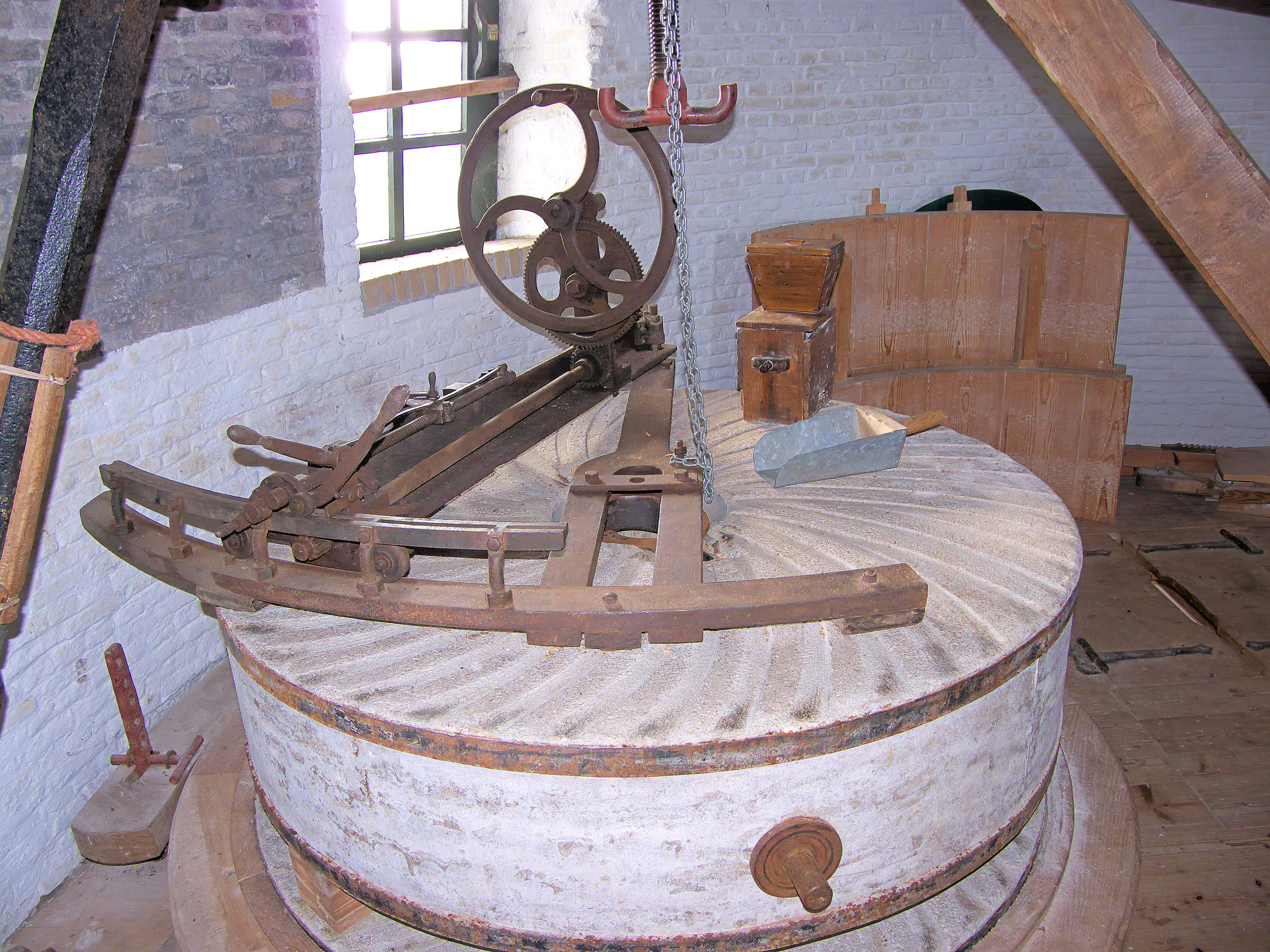 de Witte molen, bilmachine, Meeuwen, Noord-Brabant